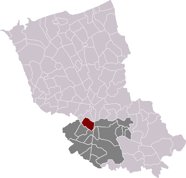 Locatie gemeente Stapel in arrondissement Duinkerke. Zelfgemaakt. Location of Staple municipality in the arrondissement of Dunkirk. Self made. Localisation de la commune de Staple dans l'arrondissement de Dunkerque. Fait moi-même.